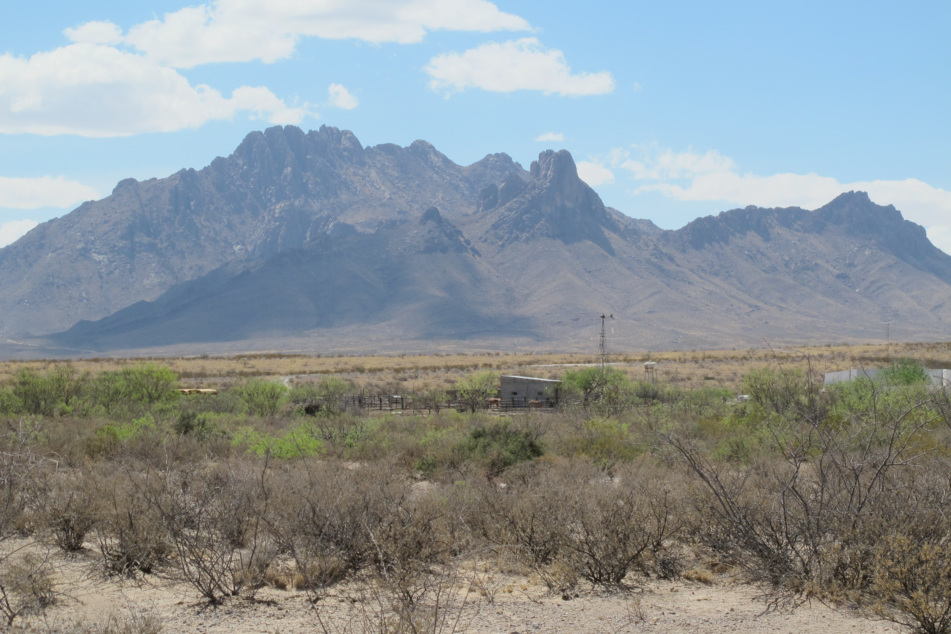 Rancho Las Palmas